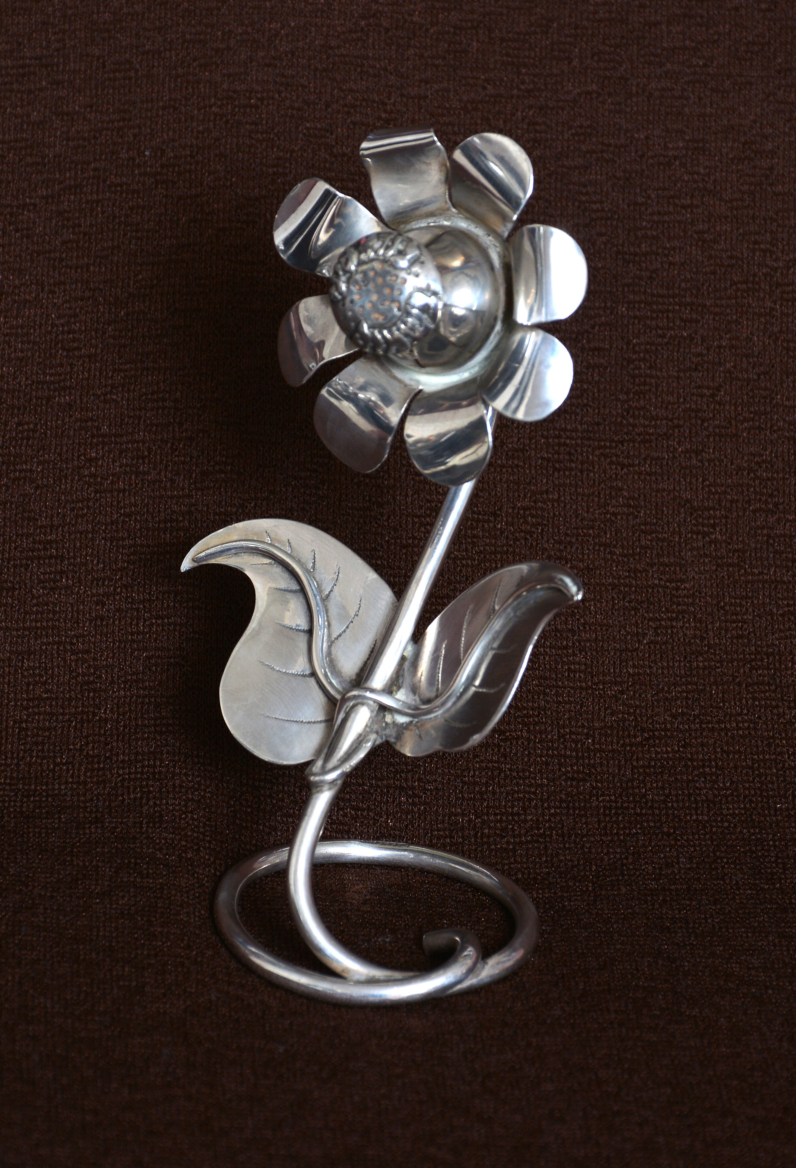 ייִדיש: א זילבערנע בלימל, א בשמים האלטער, געשאַפֿן דורך רבי חיים-יוסף-מאיר עלעפאנט